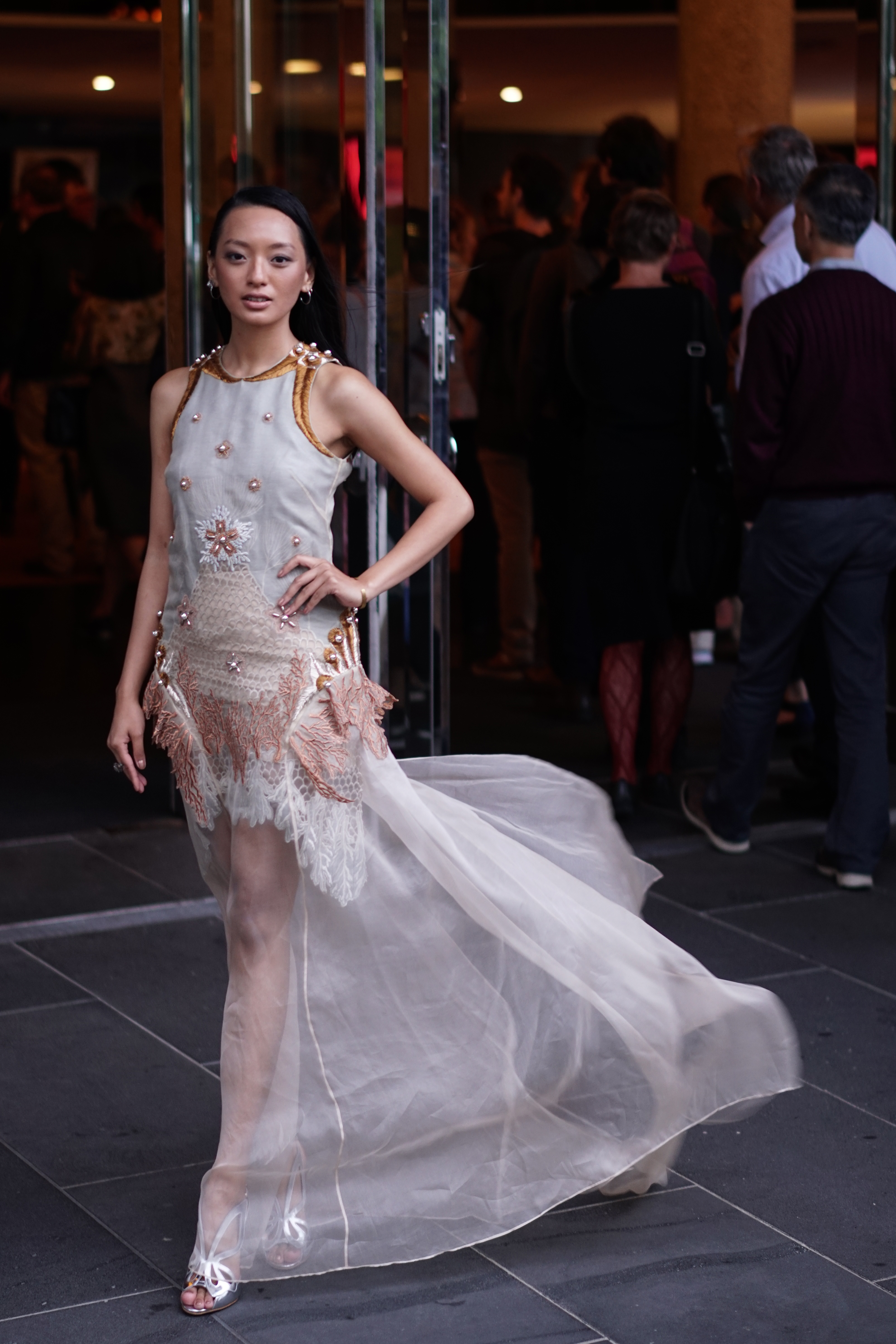 Asmara Abigail in the world premiere of Setan Jawa at Asia Pacific Triennial of Peforming Arts Melbourne, Australia 24 February 2017.